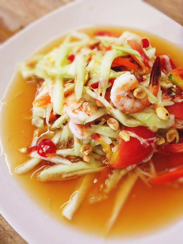 ส้มตำ ตำถาด